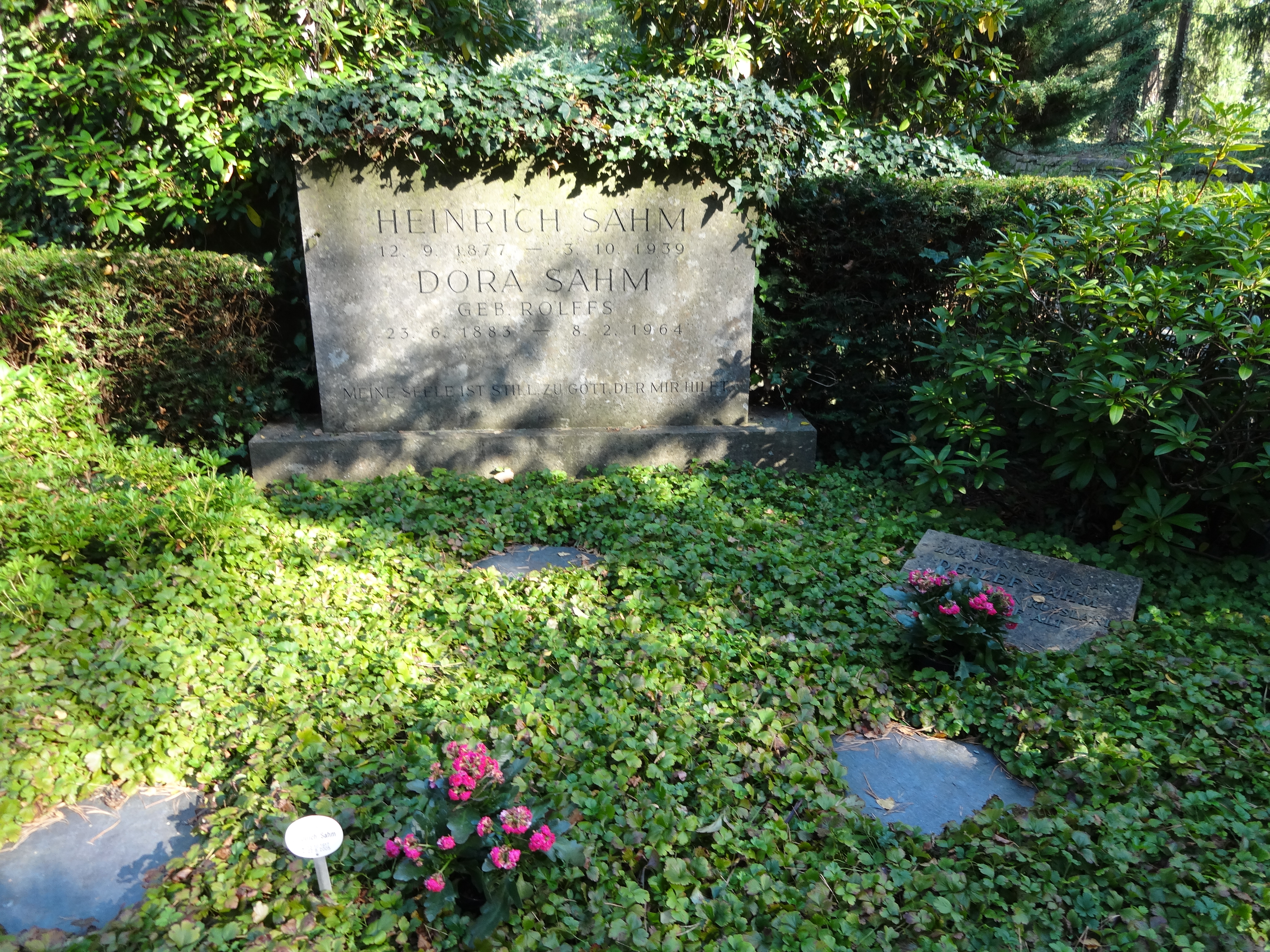 ehemaliges Ehrengrab von Heinrich Sahm auf dem Waldfriedhof Dahlem, der Friedhof ist als Gartendenkmal der Stadt Berlin (Nr. 09045949)This is a photograph of an architectural monument.